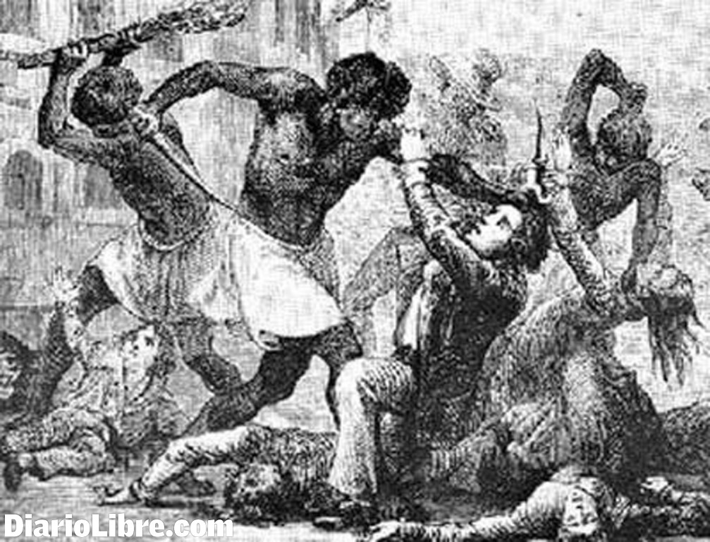 Deguello de Moca 1805